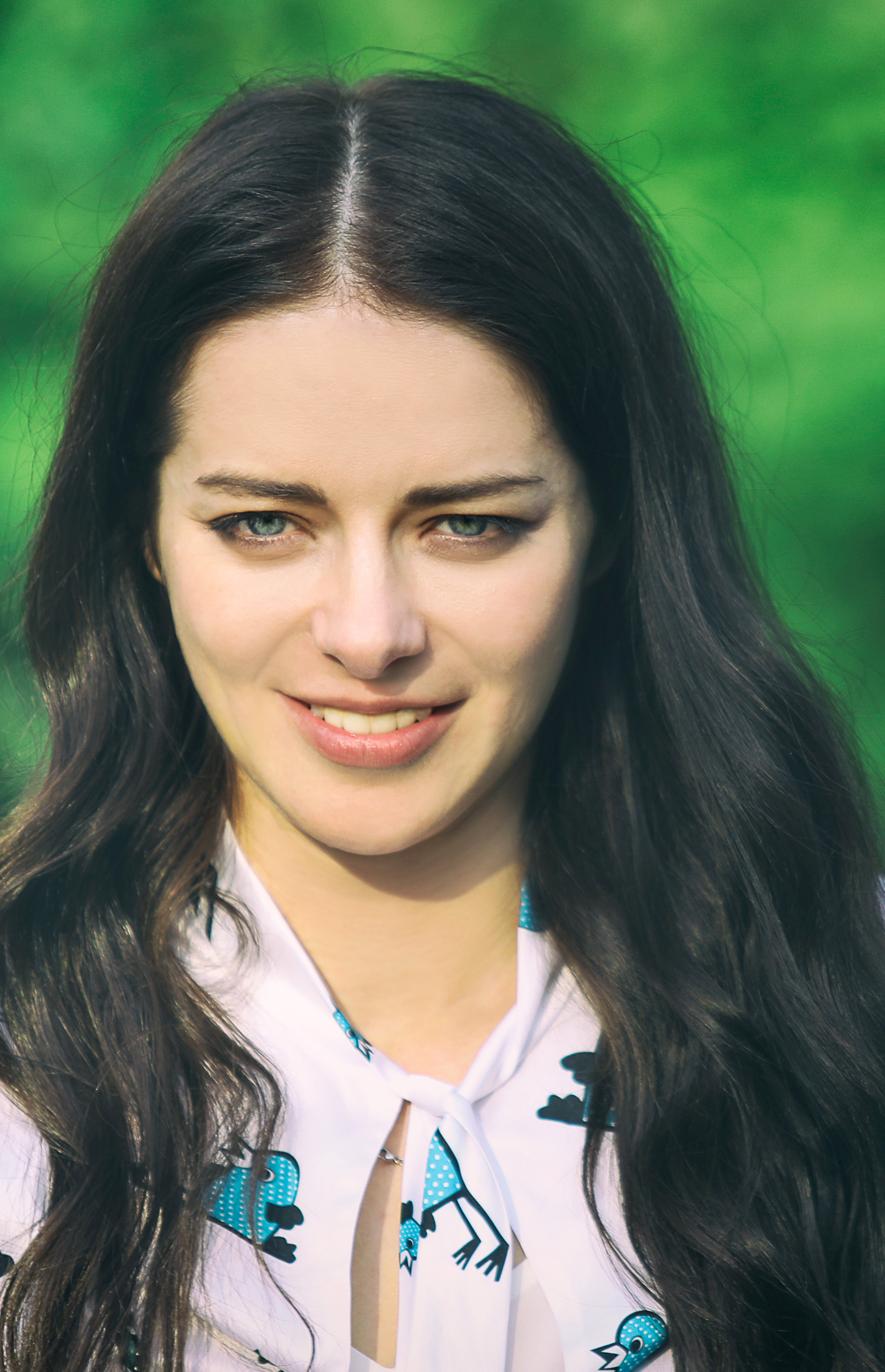 Российская актриса театра и кино Марина Александрова на благотворительном фестивале Галафест- 2018 в Москве.